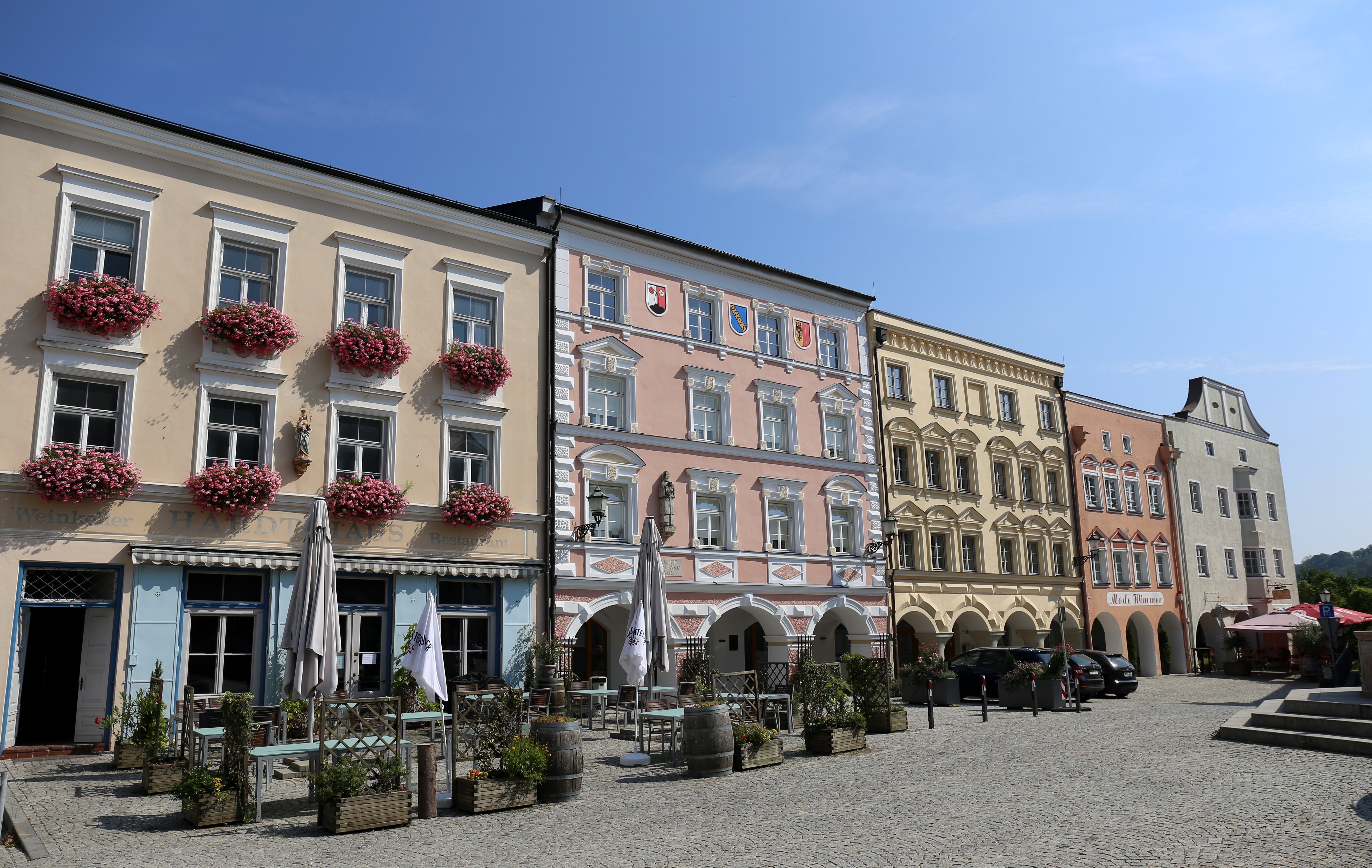 Marktplatz 31, 32, 33, 34, 35, Kraiburg am Inn